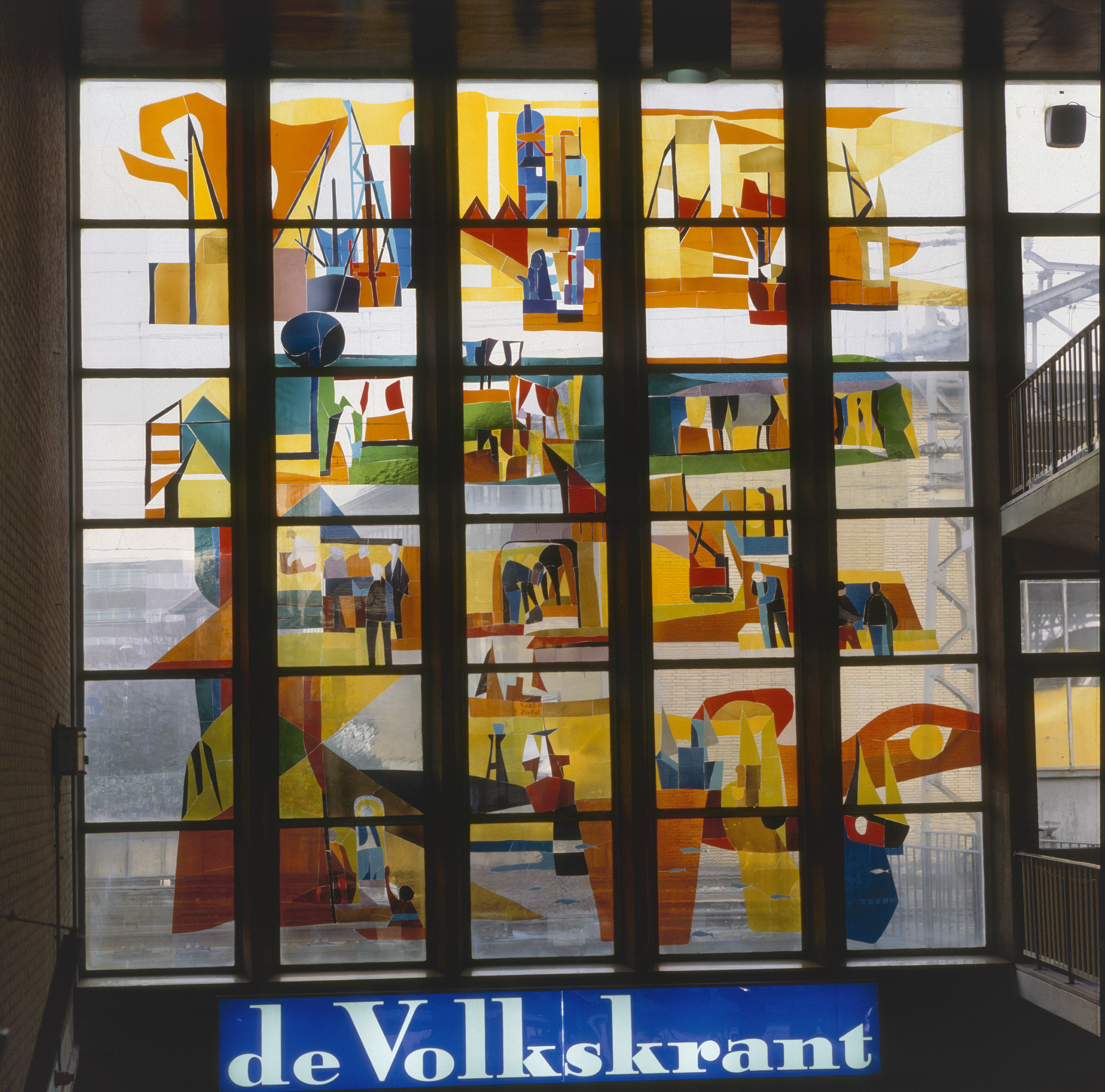 Glasapplique van Lex Horn (1954) op het NS-station in Eindhoven (opmerking: Gefotografeerd voor Glas in lood in Nederland 1817-1968)